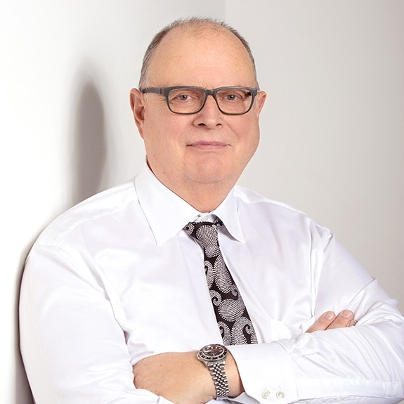 Prof. Dr. med Ingo J. Diel, 2018